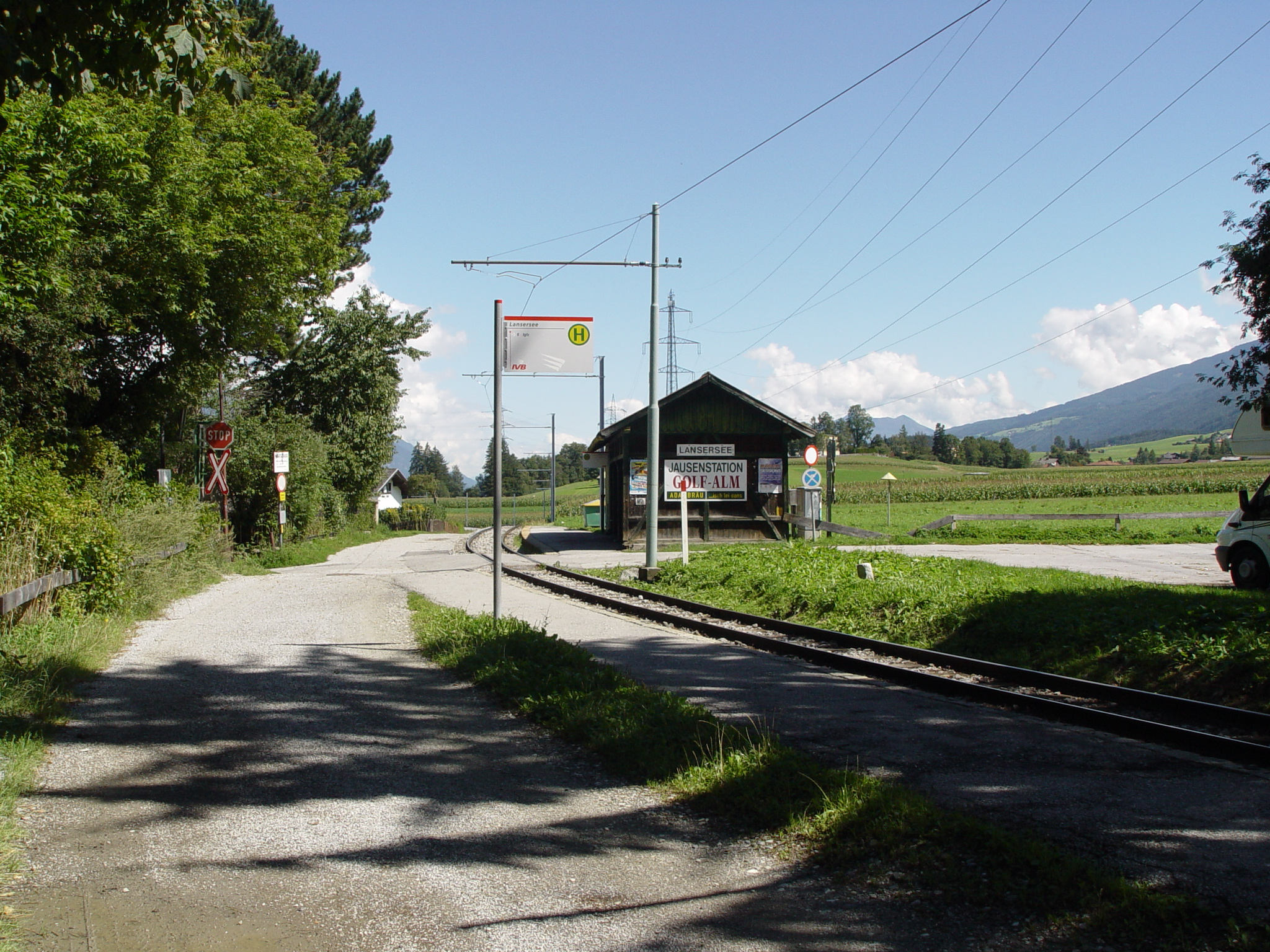 Haltestelle Lanser See der Innsbrucker Mittelgebirgsbahn This media shows the remarkable cultural object in the Austrian state of Tyrol listed by the Tyrolean Art Cadastre with the ID 129383. (on tirisMaps, on tirisdienste.at, pdf, more images on Commons)